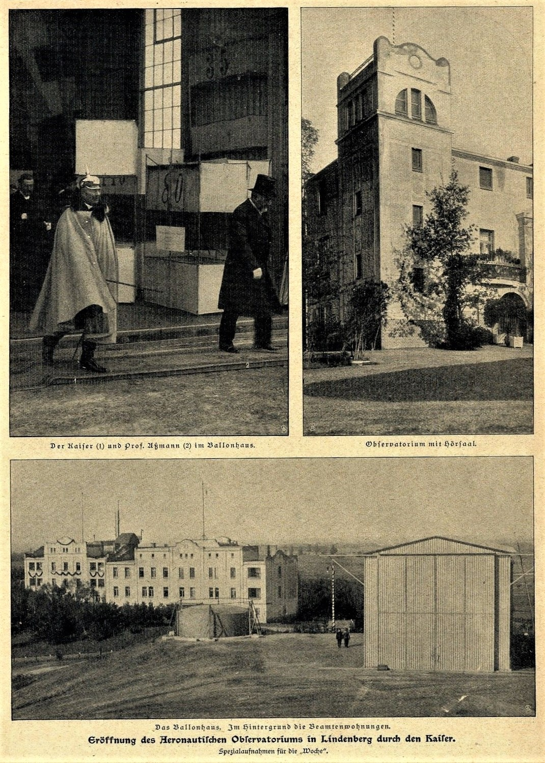 Eröffnung des Aeronautischen Observatoriums in Lindenberg durch Kaiser Wilhelm II. und Richard Aßmann, Okt. 1905. Kaiser Wilhelm II und Professor Aßmann im Ballonhaus Observatorium mit Hörsaal Das Ballonhaus. Im Hintergrund die Beamtenwohnungen